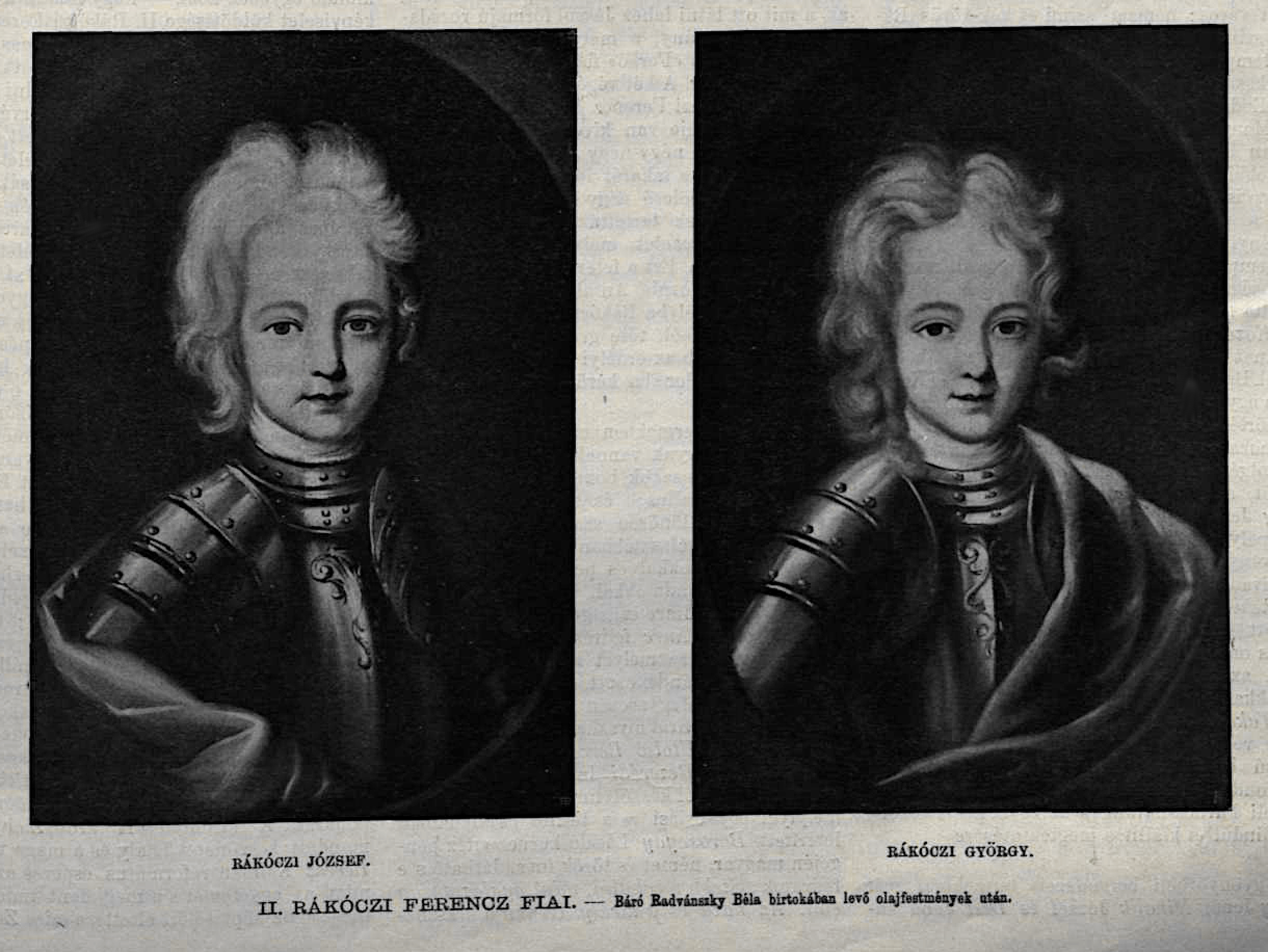 Rákóczi Ferenc fiai József és György, a Vasárnapi Ujság illusztrációja Vasárnapi Ujság 50. évf. 31. sz. (1903. augusztus 2.)